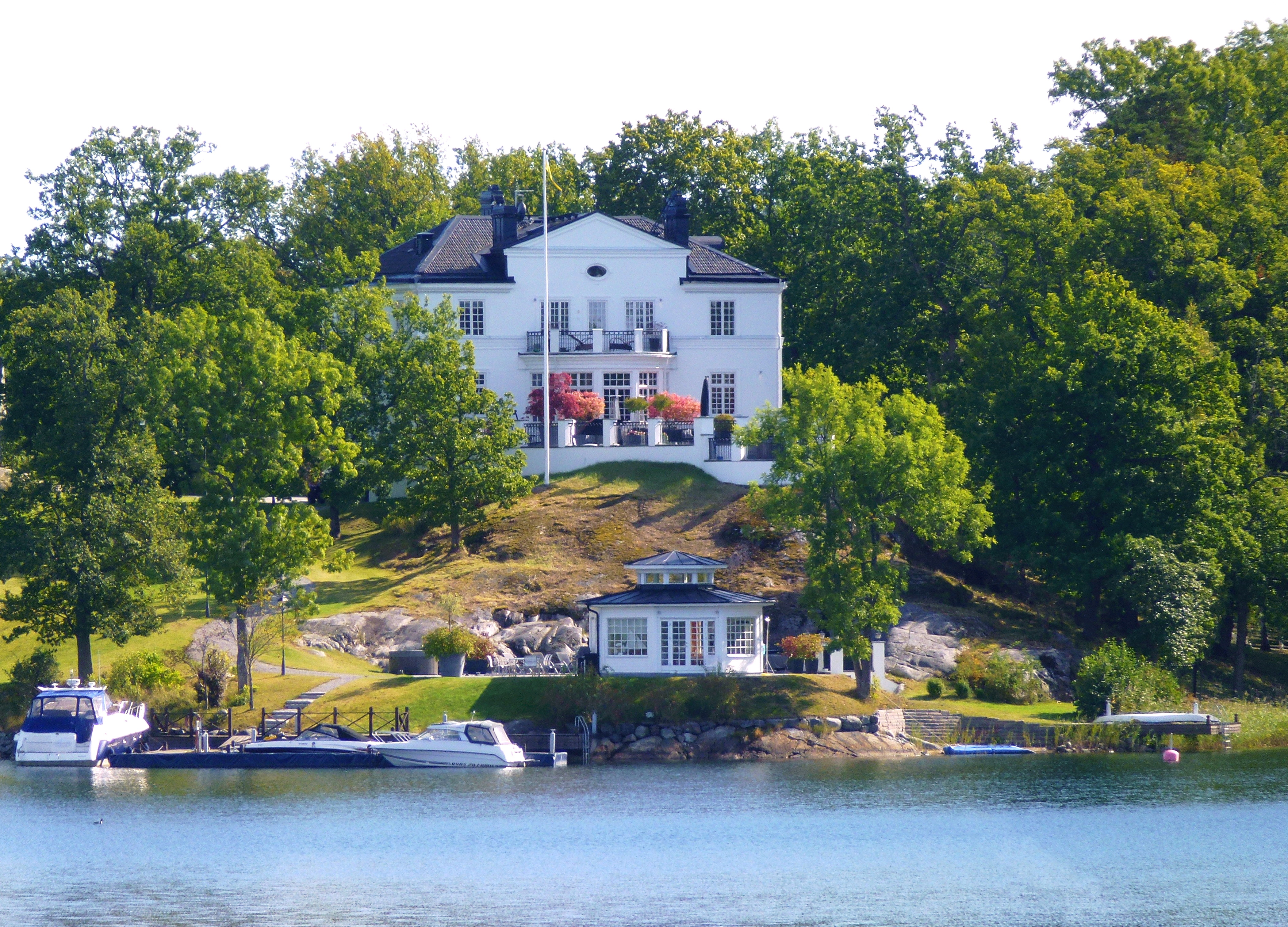 Villa Farsta udde, Gustavsberg, ritad 1910 av Ferdinand Boberg för direktör Odelbergs dotter Maria